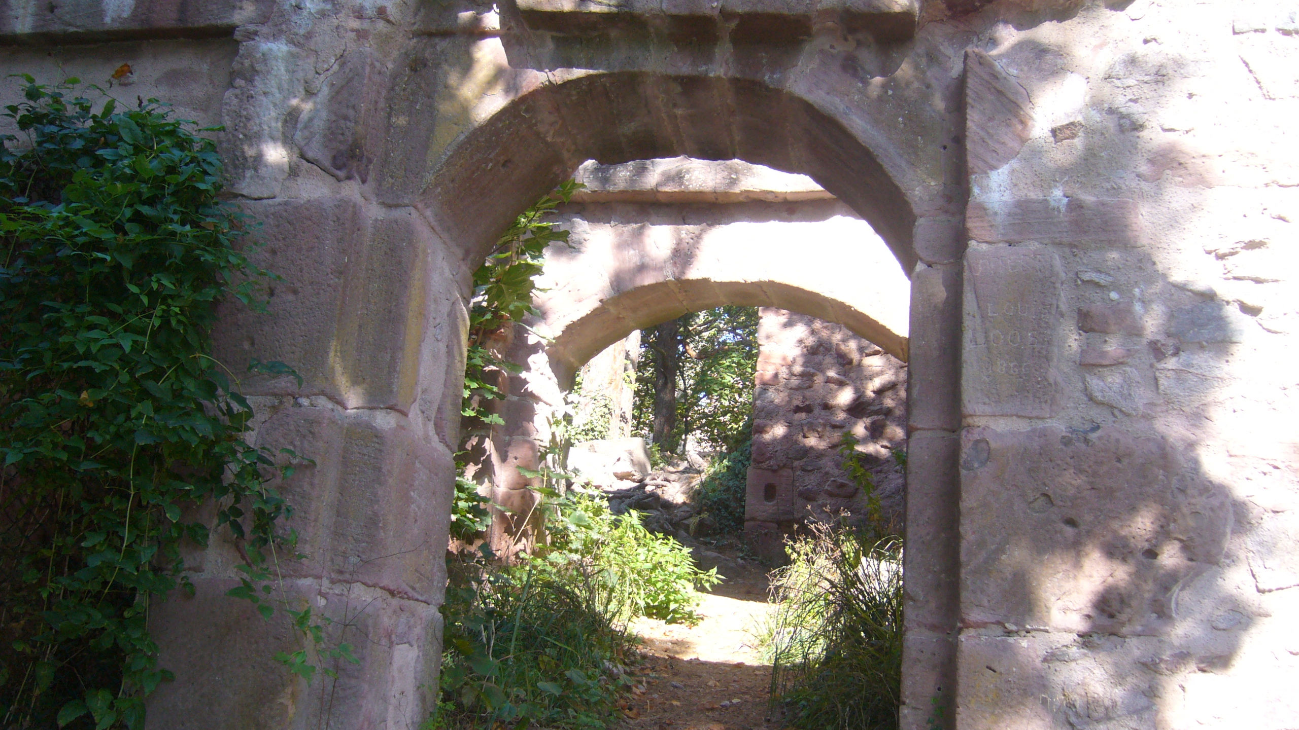 Porte d'entrée du château du Haut-Ribeaupierre